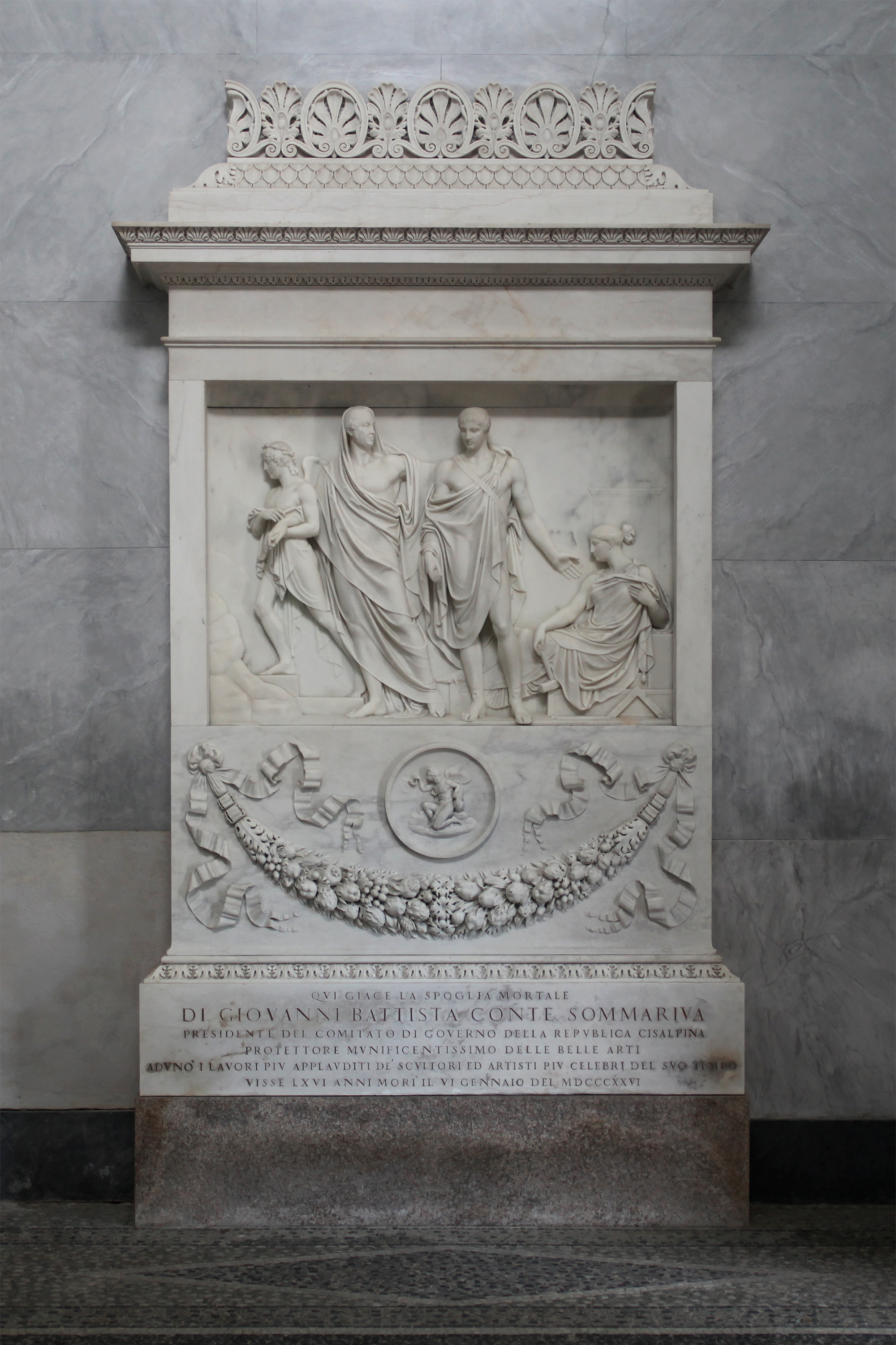 Pompeo Marchesi (1829) -Monumento funebre di Giovanni Battista Sommariva, oratorio Sommariva, Villa Carlotta, Tremezzo. Le fonti delle note e la descrizione del monumento sono disponibili all'indirizzo in Davide Bertolotti, Descrizione della Villa Sommariva sul lago di Como (Milano, 1831)